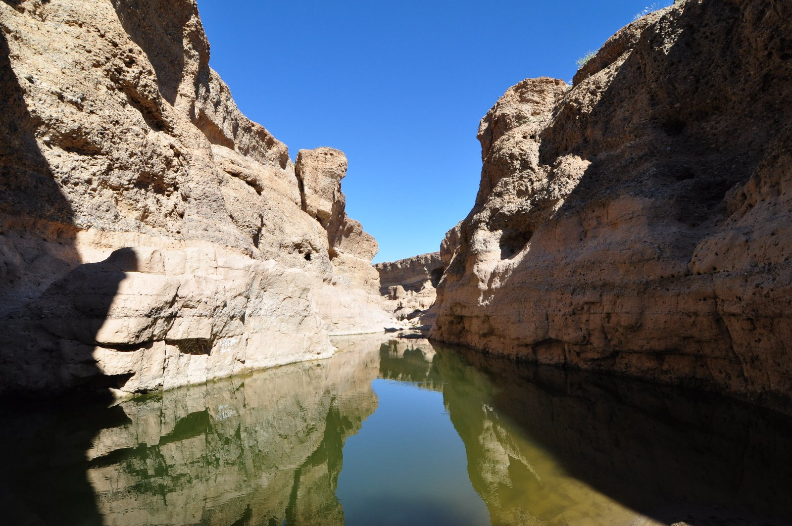 Sesriem Canyon, Namibia